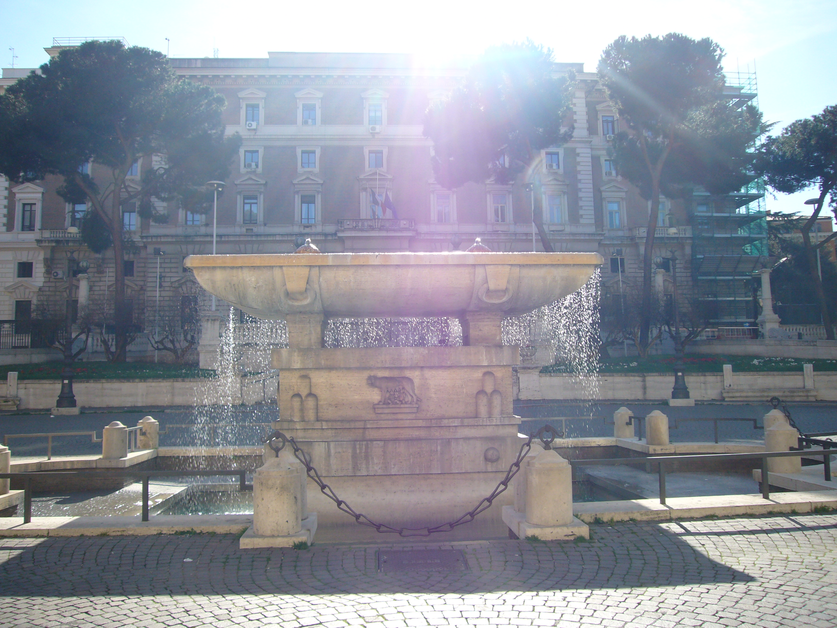 Roma, piazza, palazzo, fontana del Viminale (sede Ministero dell'Interno)